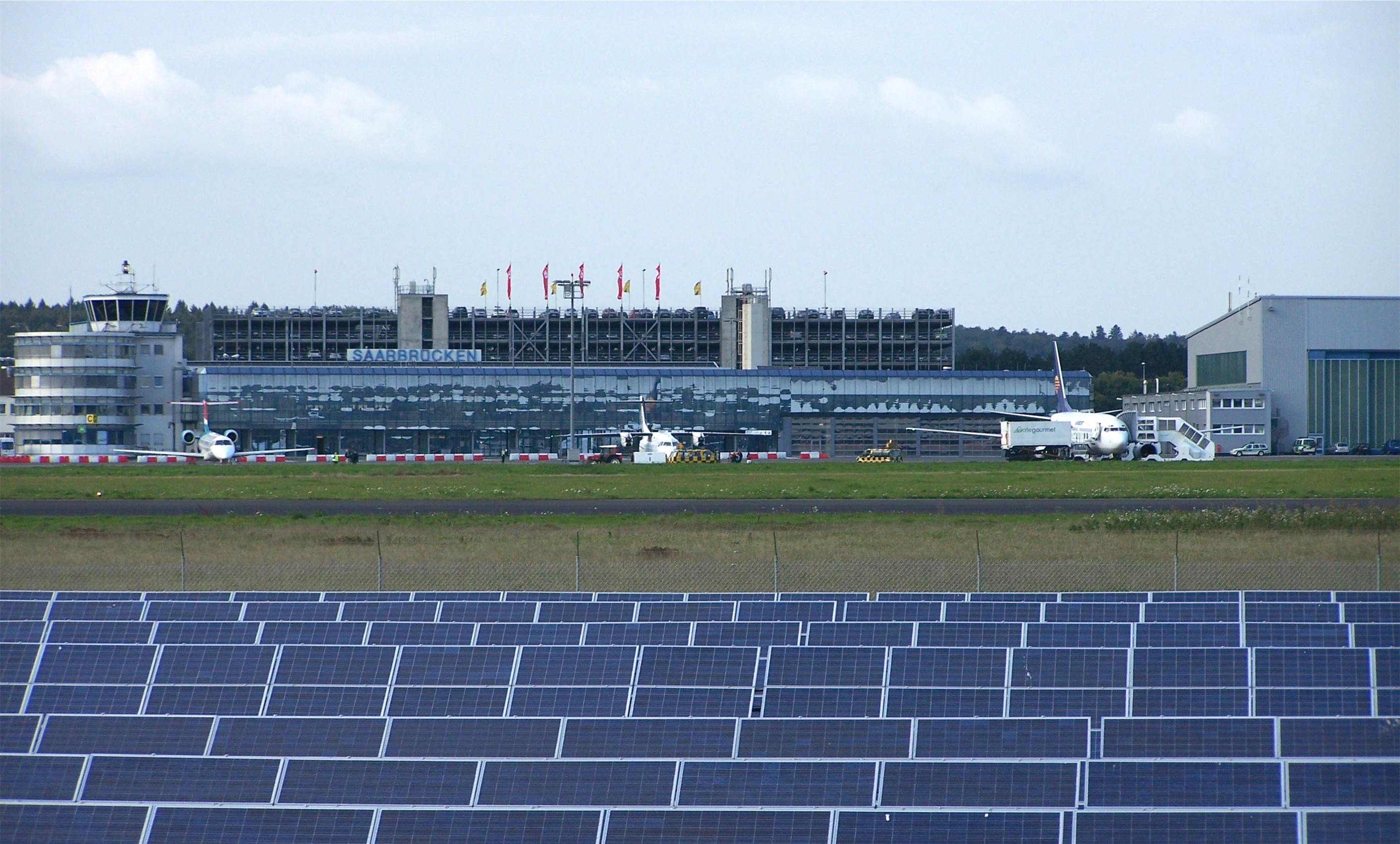 Blick auf das Terminal - im Vordergrund das Solarkraftwerk am Flughafen Saarbrücken